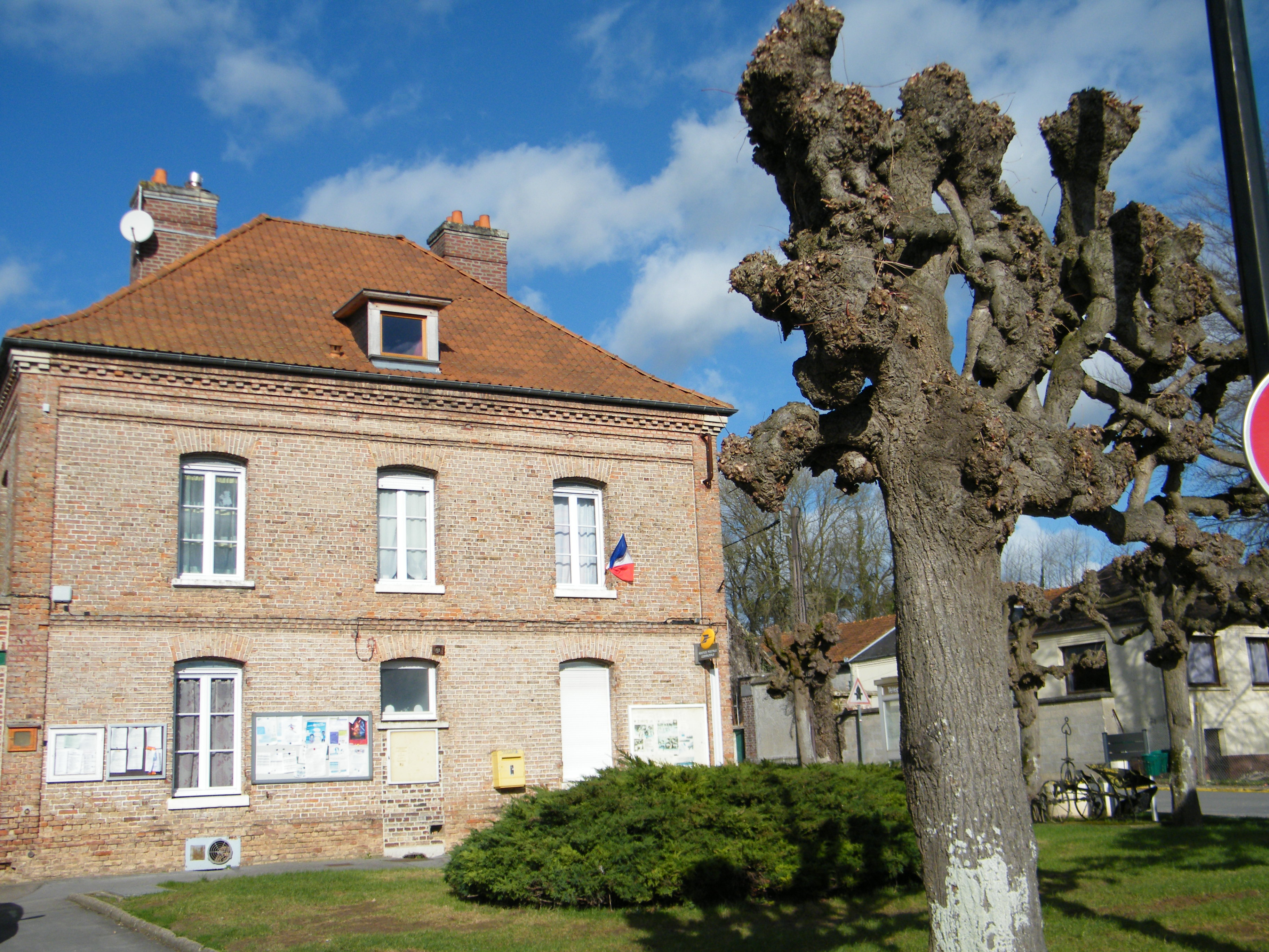 Allery, Somme, fr, mairie-école (2)